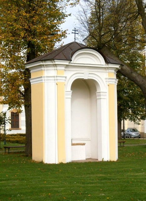 Kaplica Kalwarii Krzeszowskiej